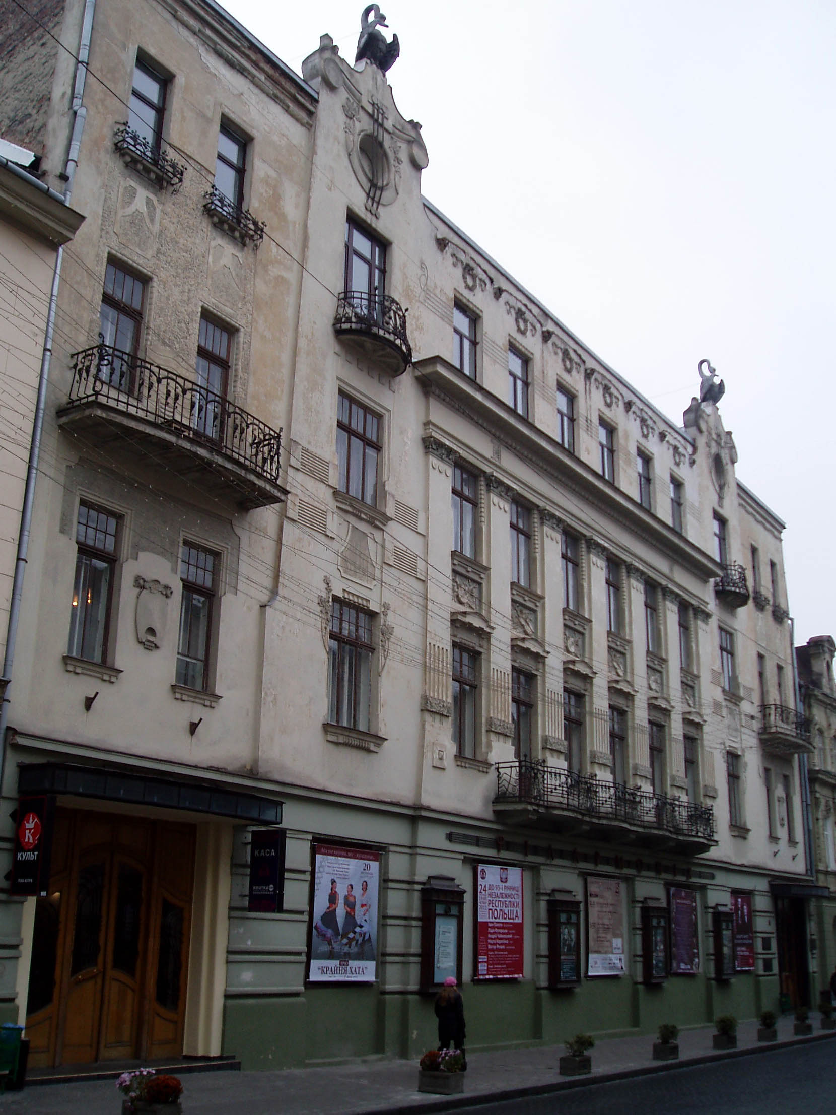 Будівля Львівської філармонії (дім № 7 на вулиці Чайковського у Львові). Архітектор Владислав Садловський (1869-1940)